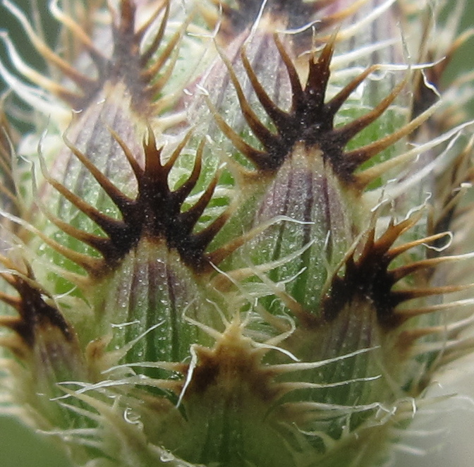 Centaurea paniculata - Detalle de las brácteas involucrales medias.